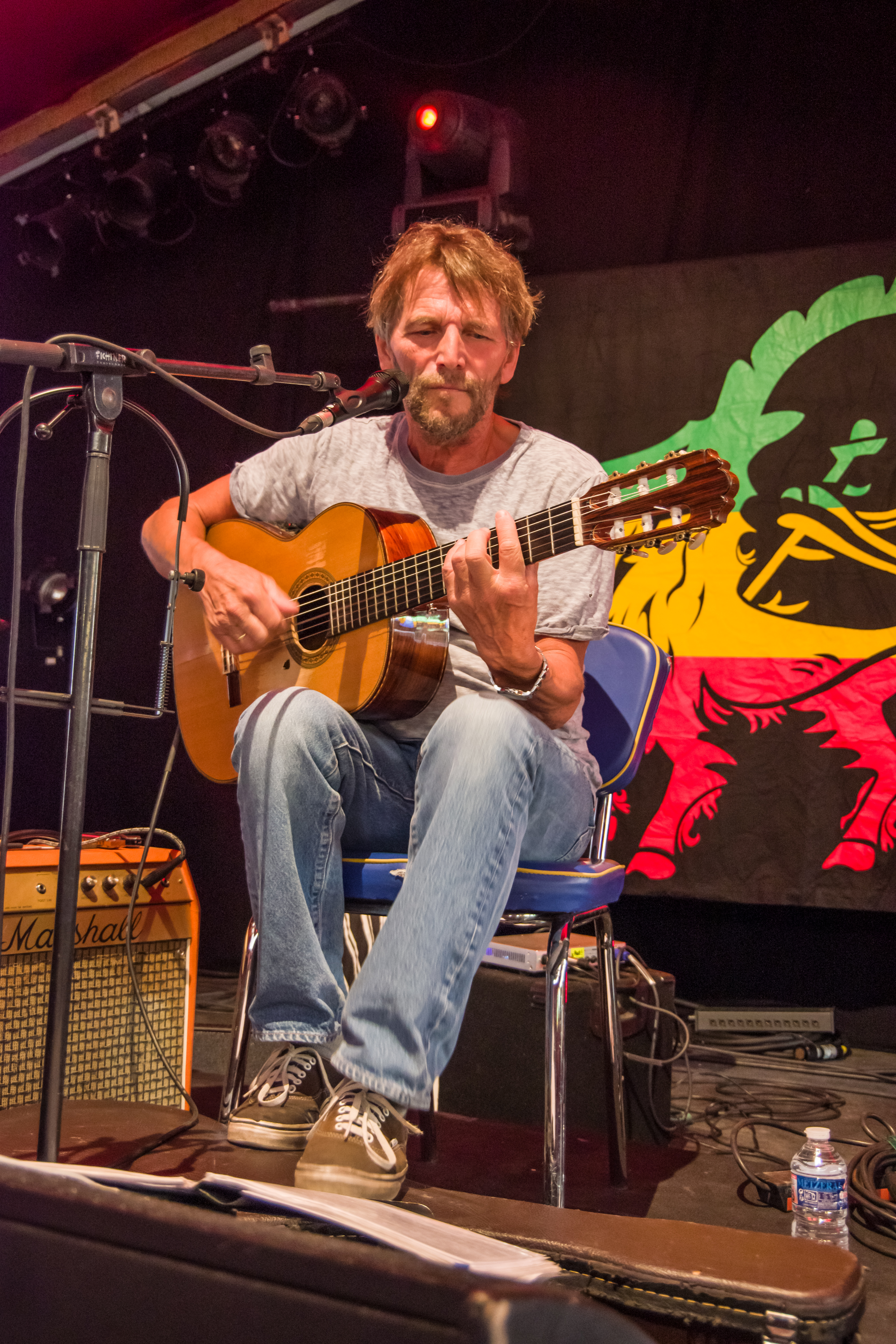 Das Zelt-Musik-Festival 2018 in Freiburg im Breisgau 23.07.2018 Hans Söllner und Bayaman'Sissdem